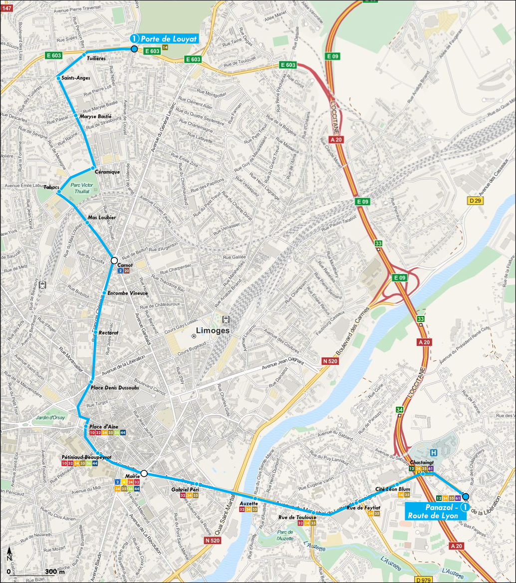 Tracé géographiquement exact de la ligne 1 du trolleybus de Limoges (Haute-Vienne, France)